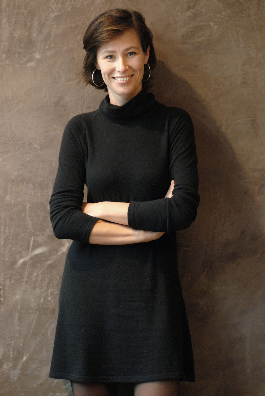 Freya Van den Bossche, Vlaamse politica voor de Socialistische Partij Anders (sp.a).